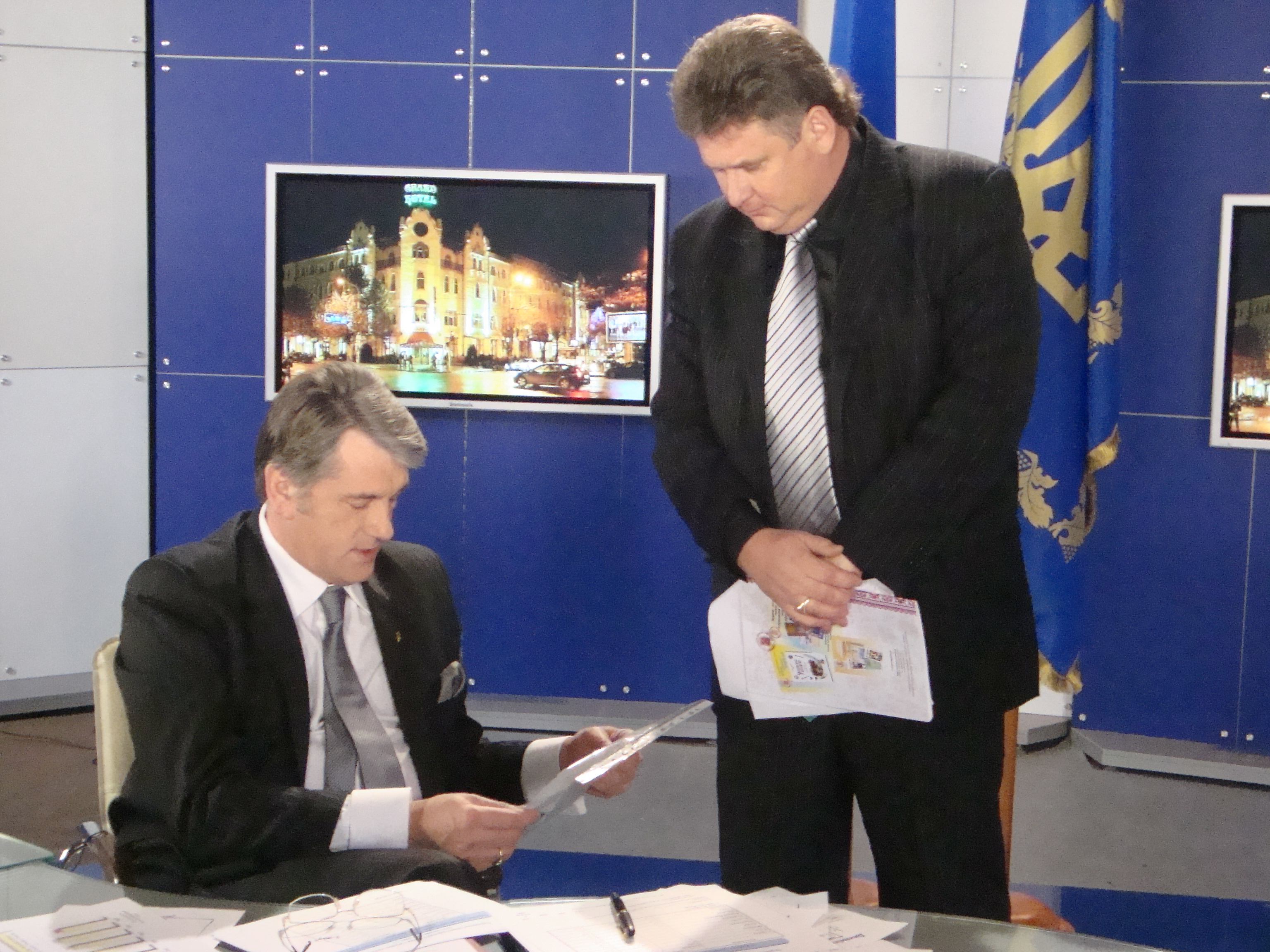 В.Ющенко Ф.Сухонос